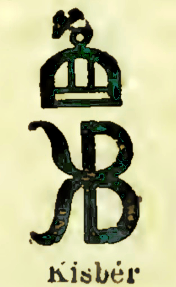 Kisbér ménesbélyeg. Jó ménesből származó csikót tüzes vassal égetett ménesbélyeggel szokás ellátni.